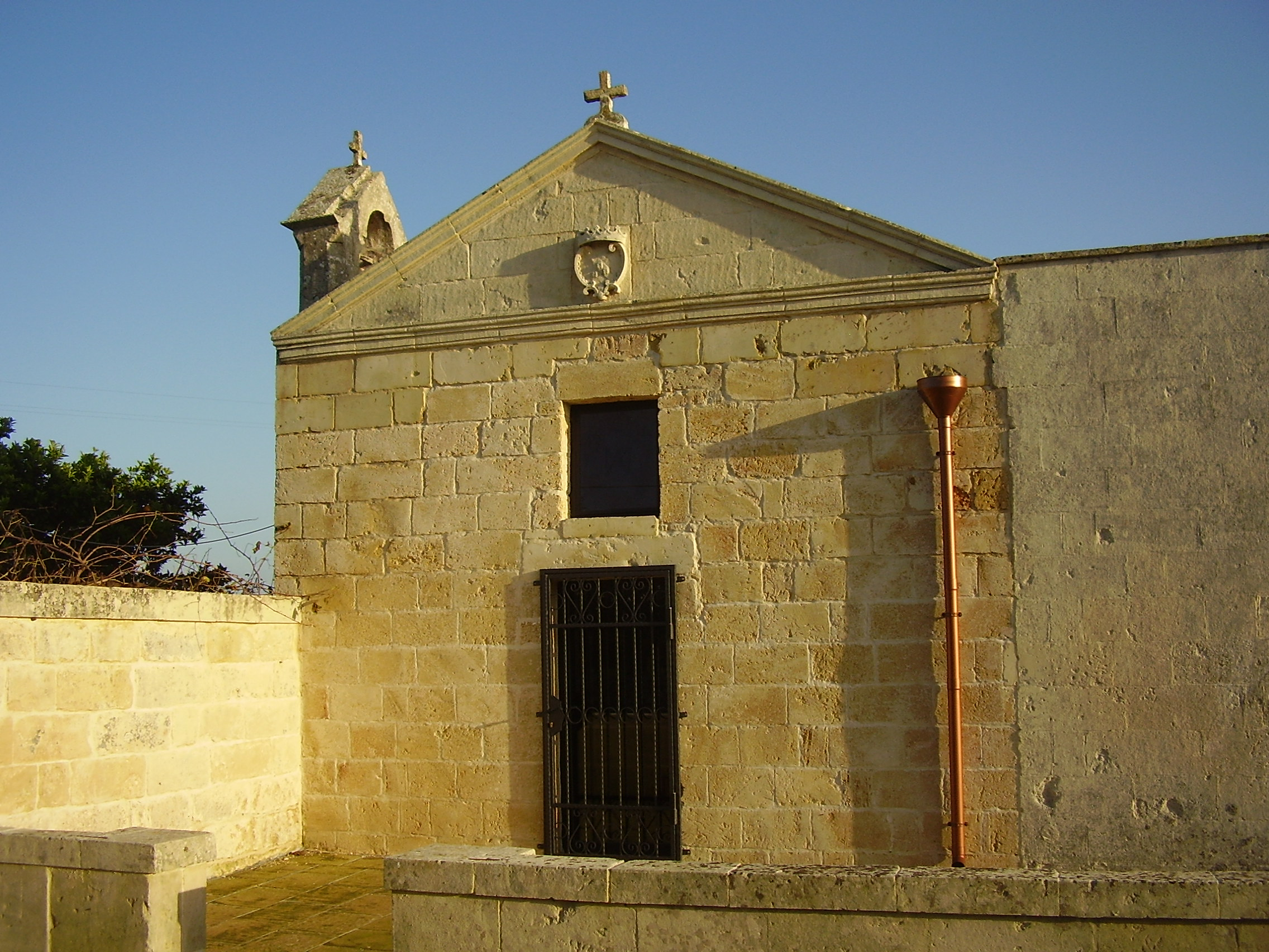 Chiesa Madonna di Costantinopoli Scorrano, Lecce